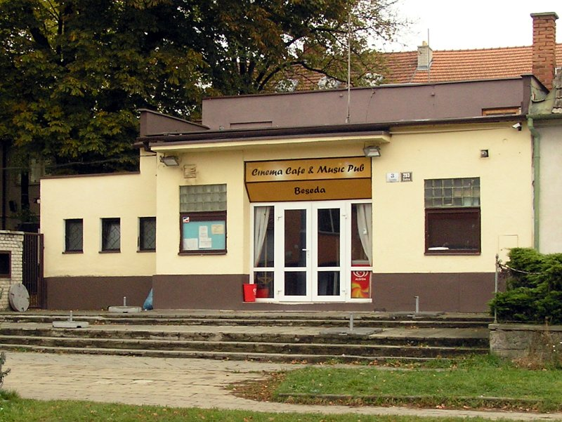 Fotografie budovy kina Beseda v Brně-Slatině